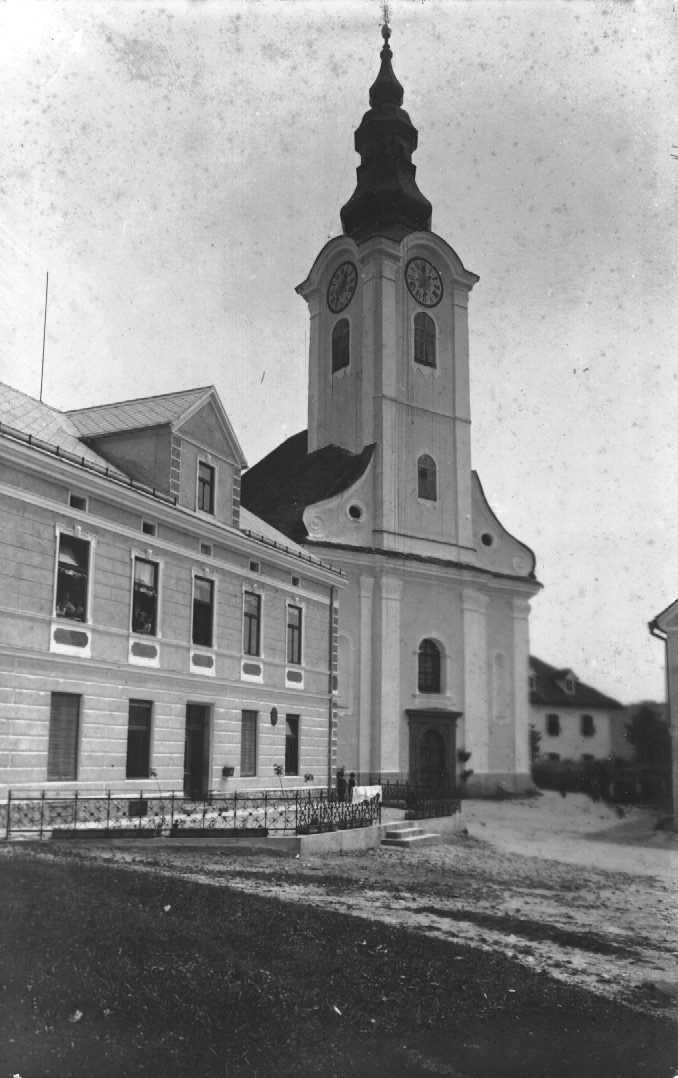 Cerkev v Ponikvi